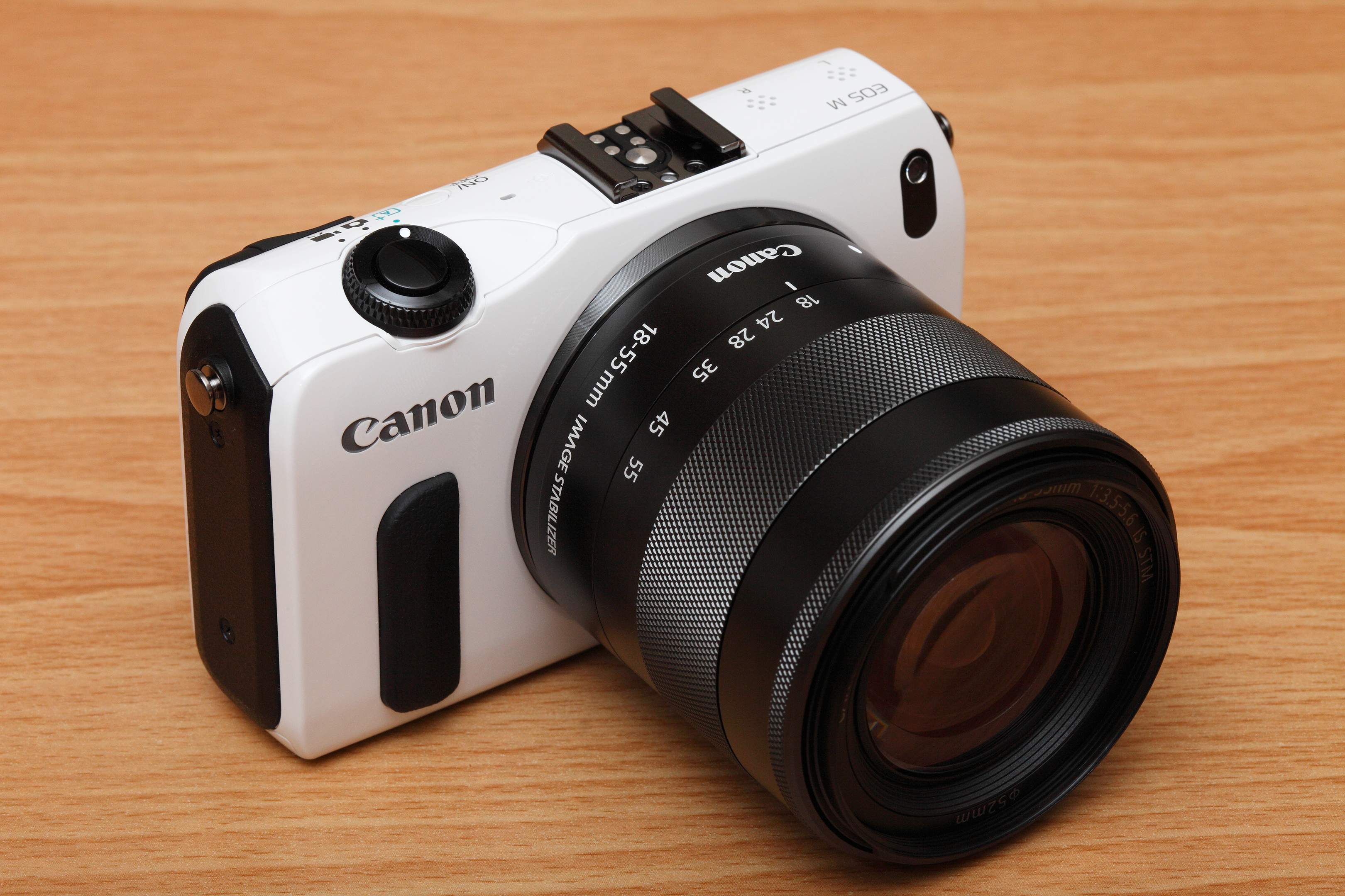 Canon EOS M數位相機白色版搭配Canon EF-M 18-55mm F3.5-5.6 IS STM。